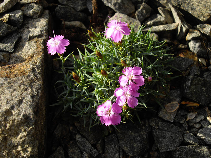 Dianthus webbianus var. alpinus